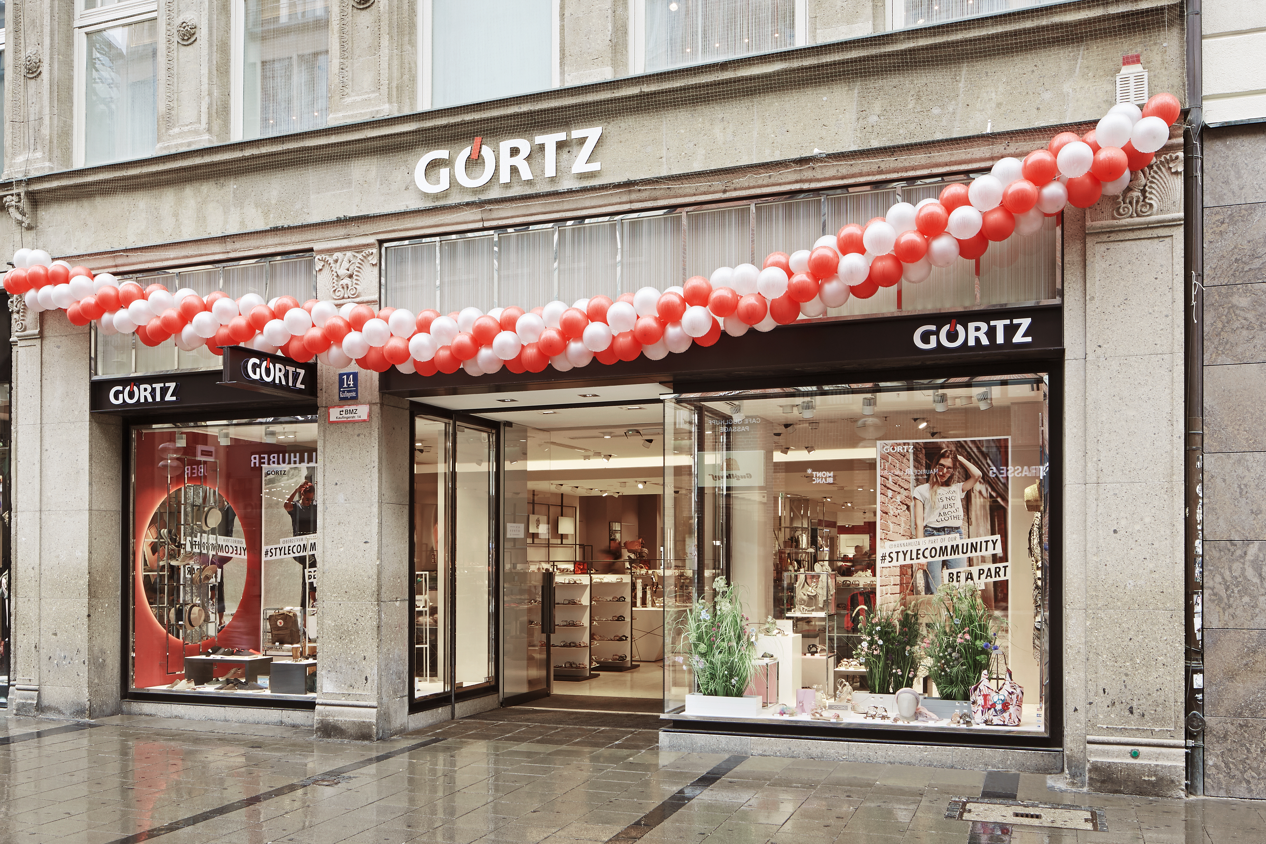 Görtz Flagshipstore in der Kaufingerstraße in München